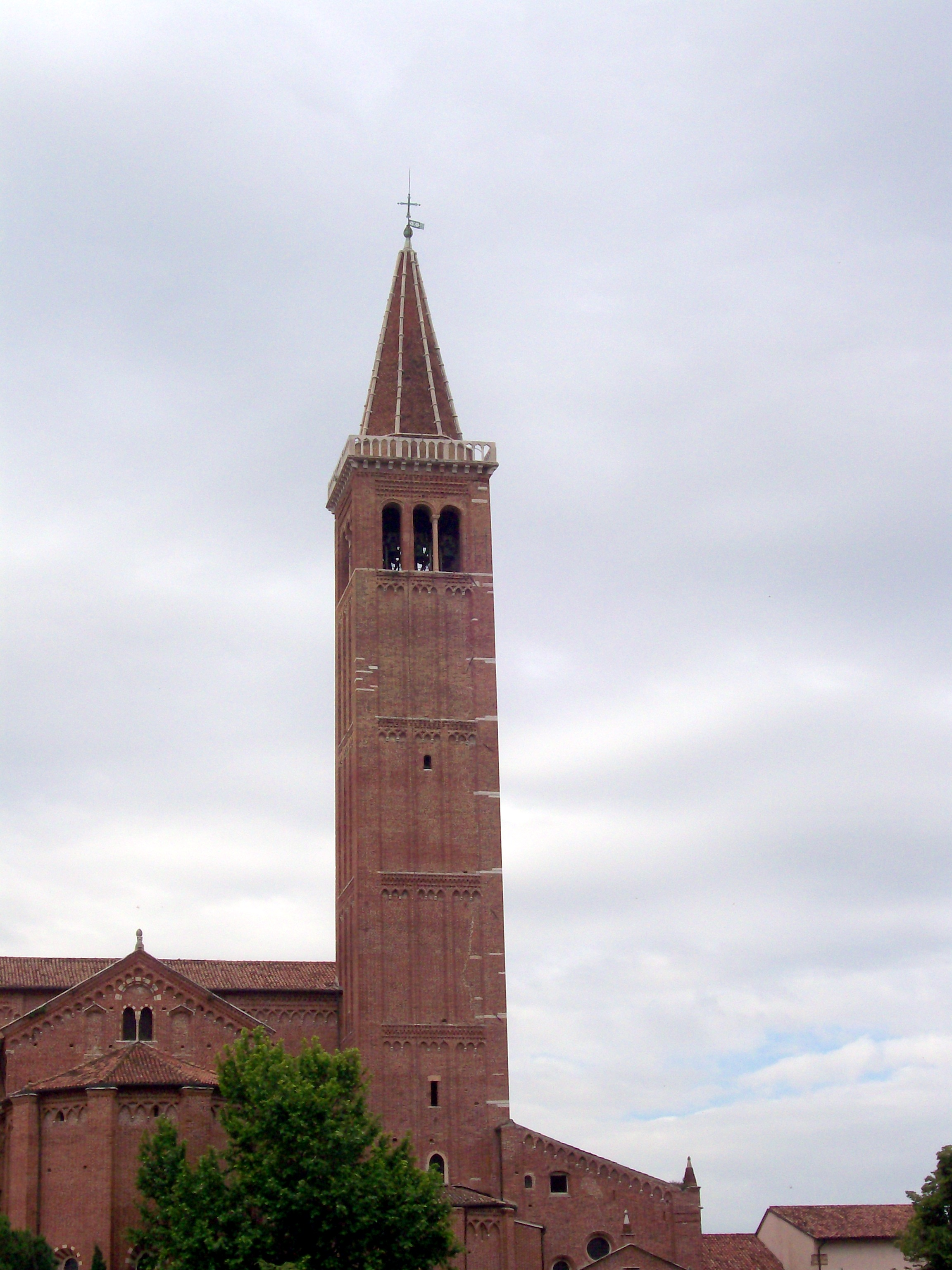 Campanile della chiesa di S. Anastasia in Verona.